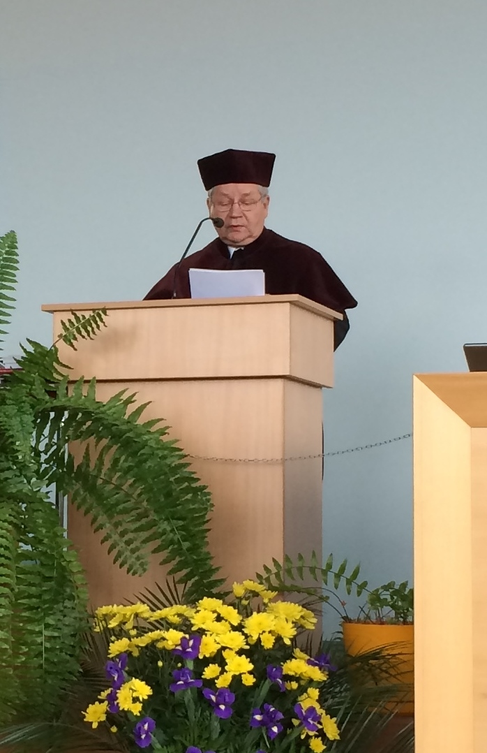 Ks. prof. Piotr Jaskóła Opole 30-10-2014